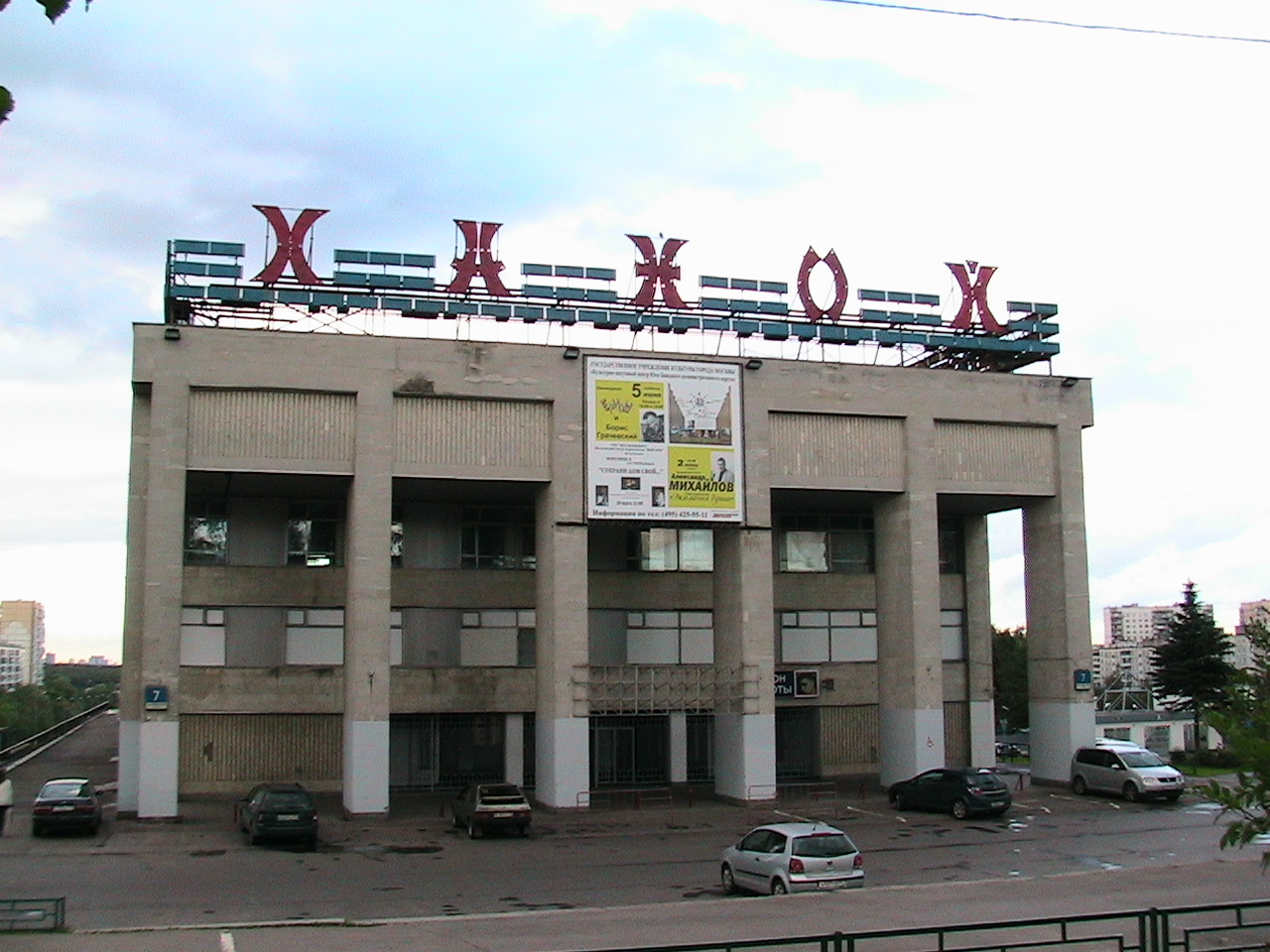 Бывший кинотеатр "Ханой" в Ясенево. Ныне - культурно-досуговой центр ЮЗАО